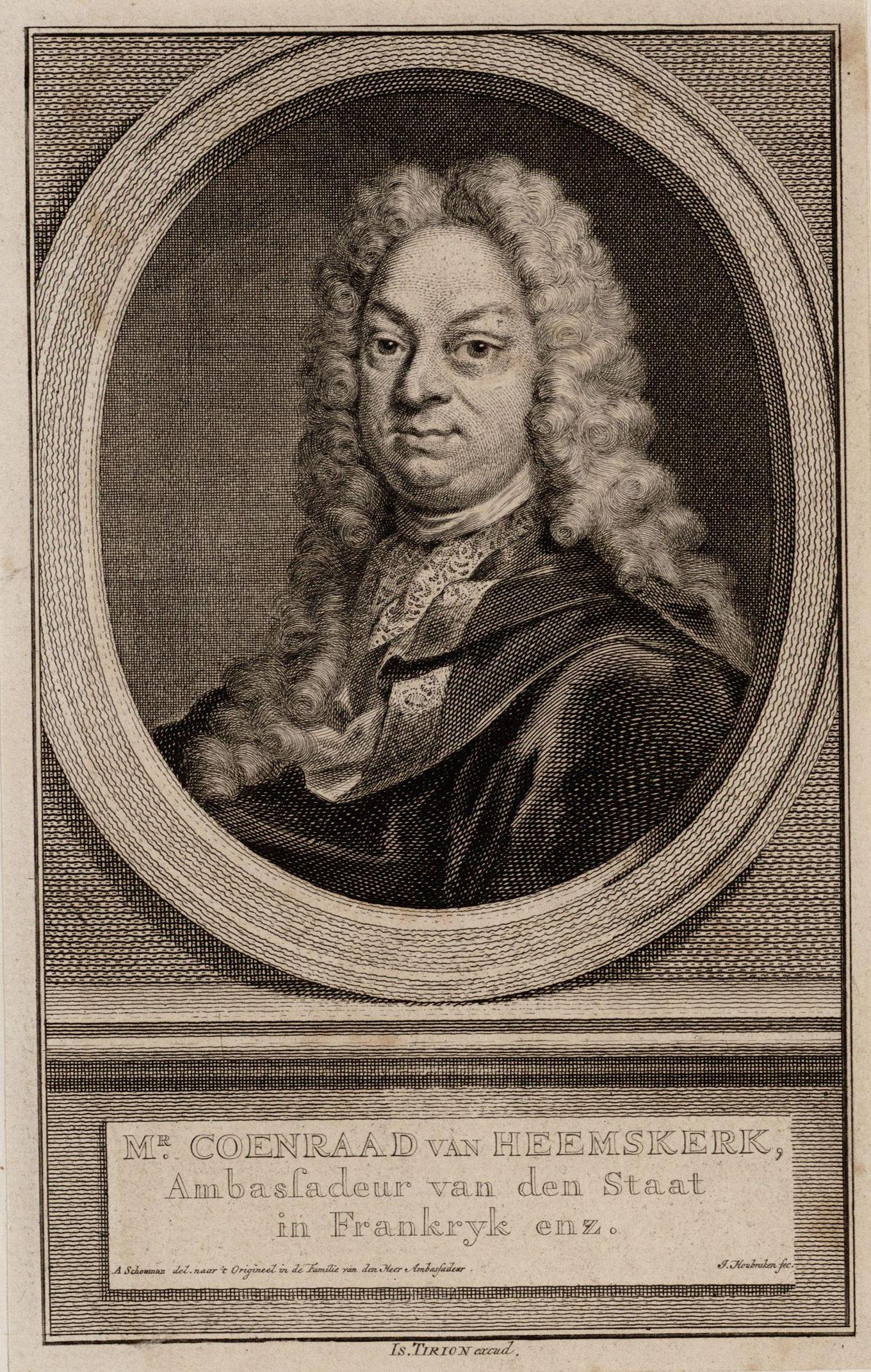 Tekst van bronsite: Coenraad van Heemskerk (12-12-1646 / 23-07-1702)Secretaris en pensionaris van Amsterdam, resp. in 1672 en 1673; Gezant in Wenen en Spanje. Afmetingen: 171 x 106 mm. Herkomst: Collectie tekeningen en prenten. Vervaardigers: Isaak Tirion (uitgever), J. Houbraken (graveur) en A. Schouman (tekenaar).Afbeeldingsbestand: 010097008550